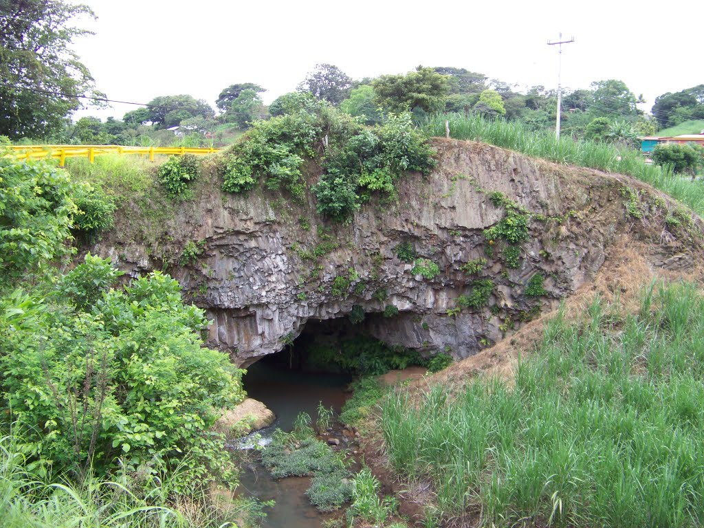 Foto del puente de piedra en Grecia.